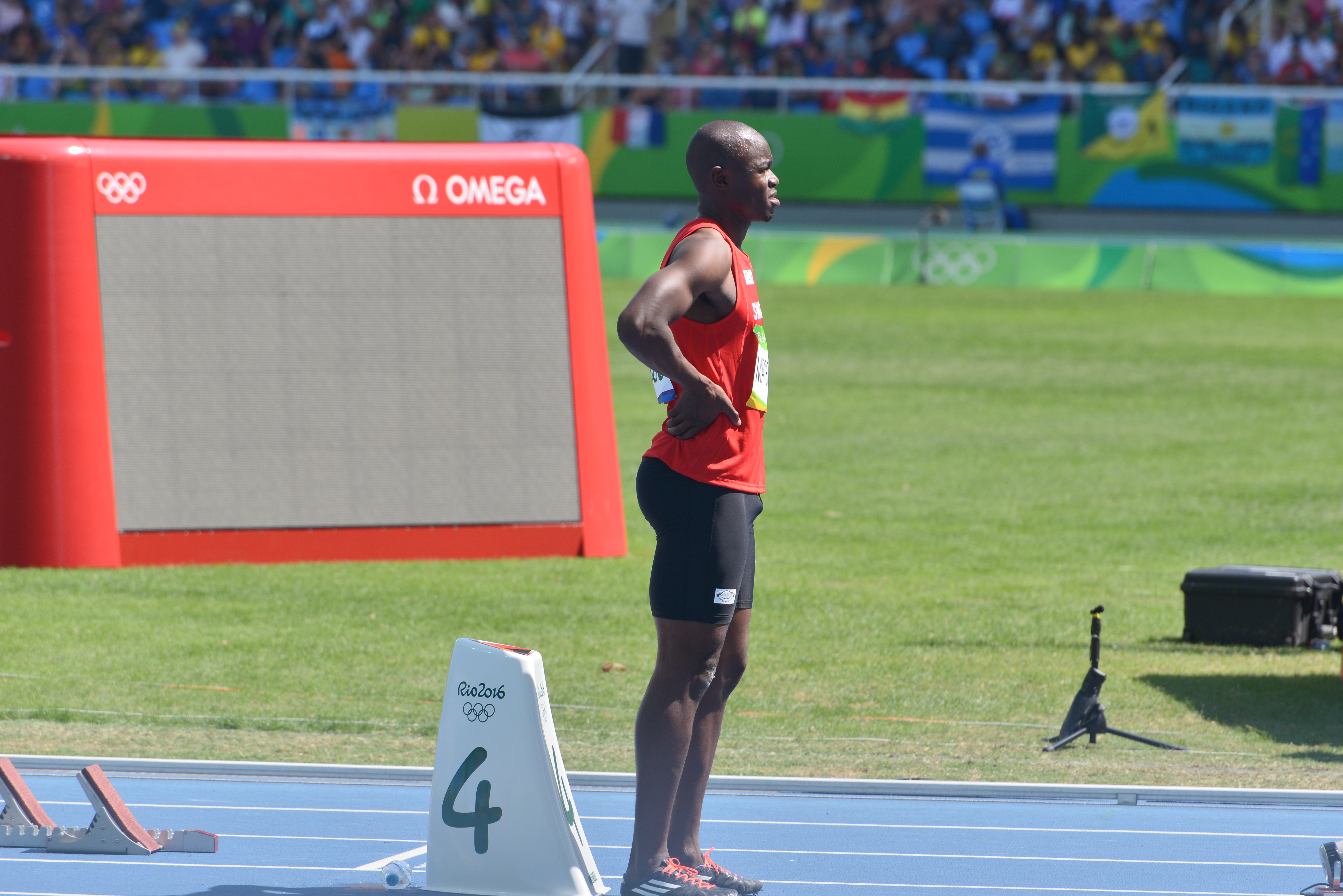 Séries du 200m Homme aux JO de Rio 2016